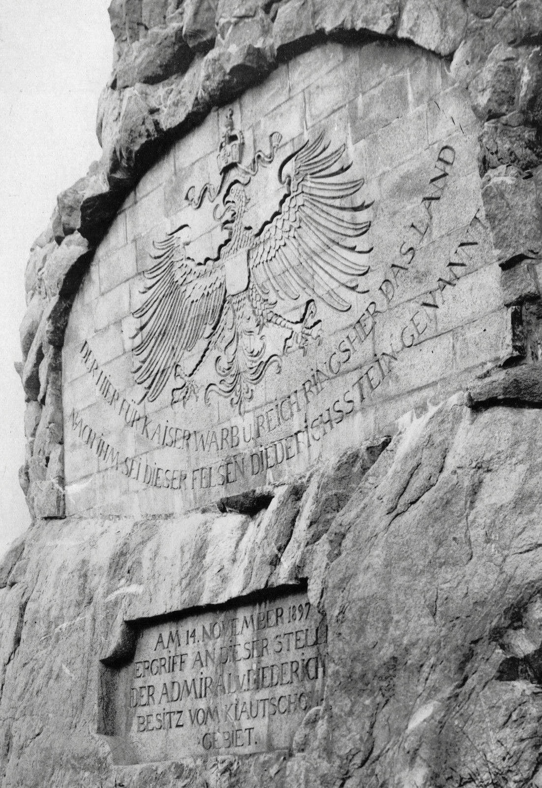 Diederichsstein Tsingtau